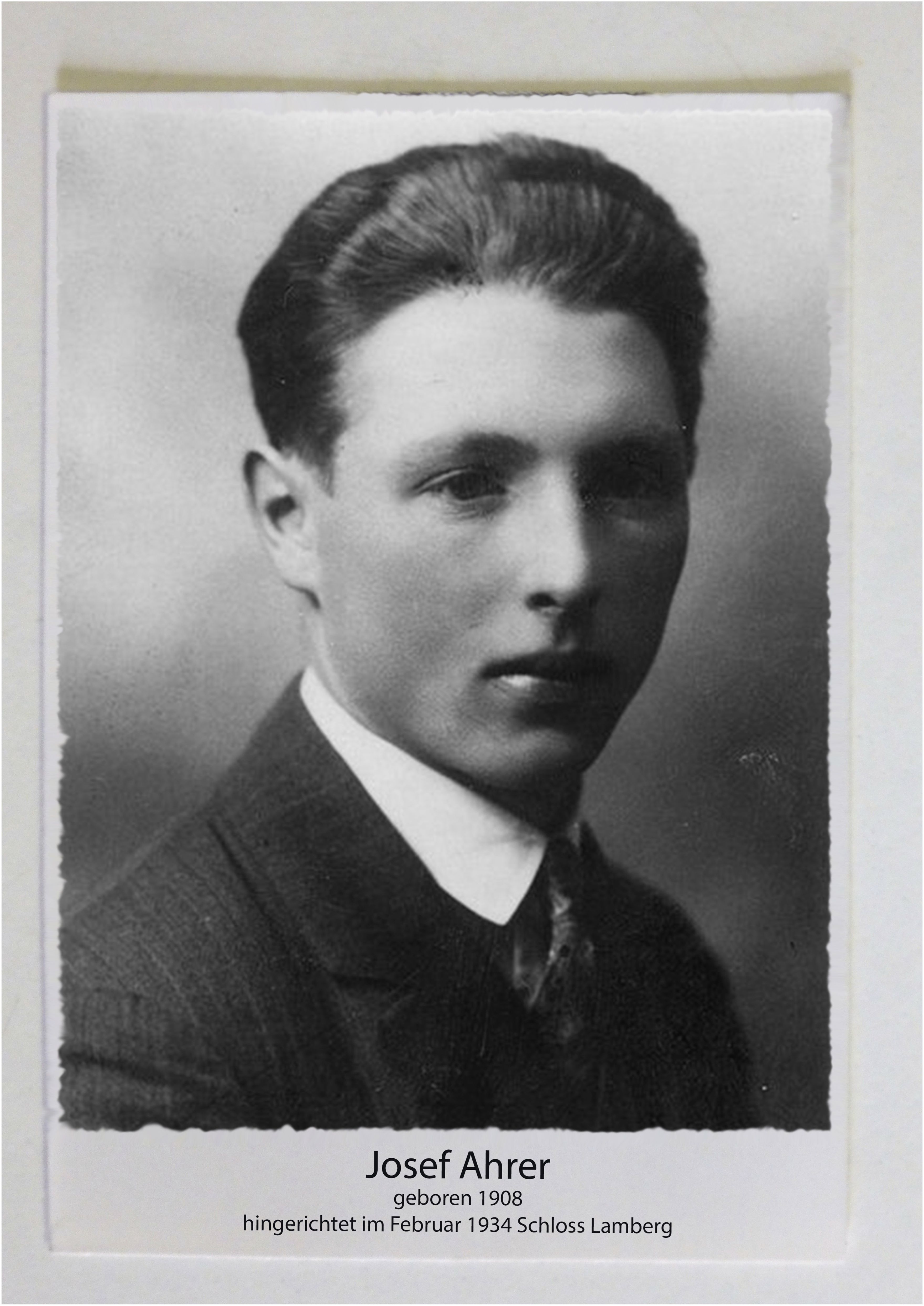 Abbildung von Josef Ahrer